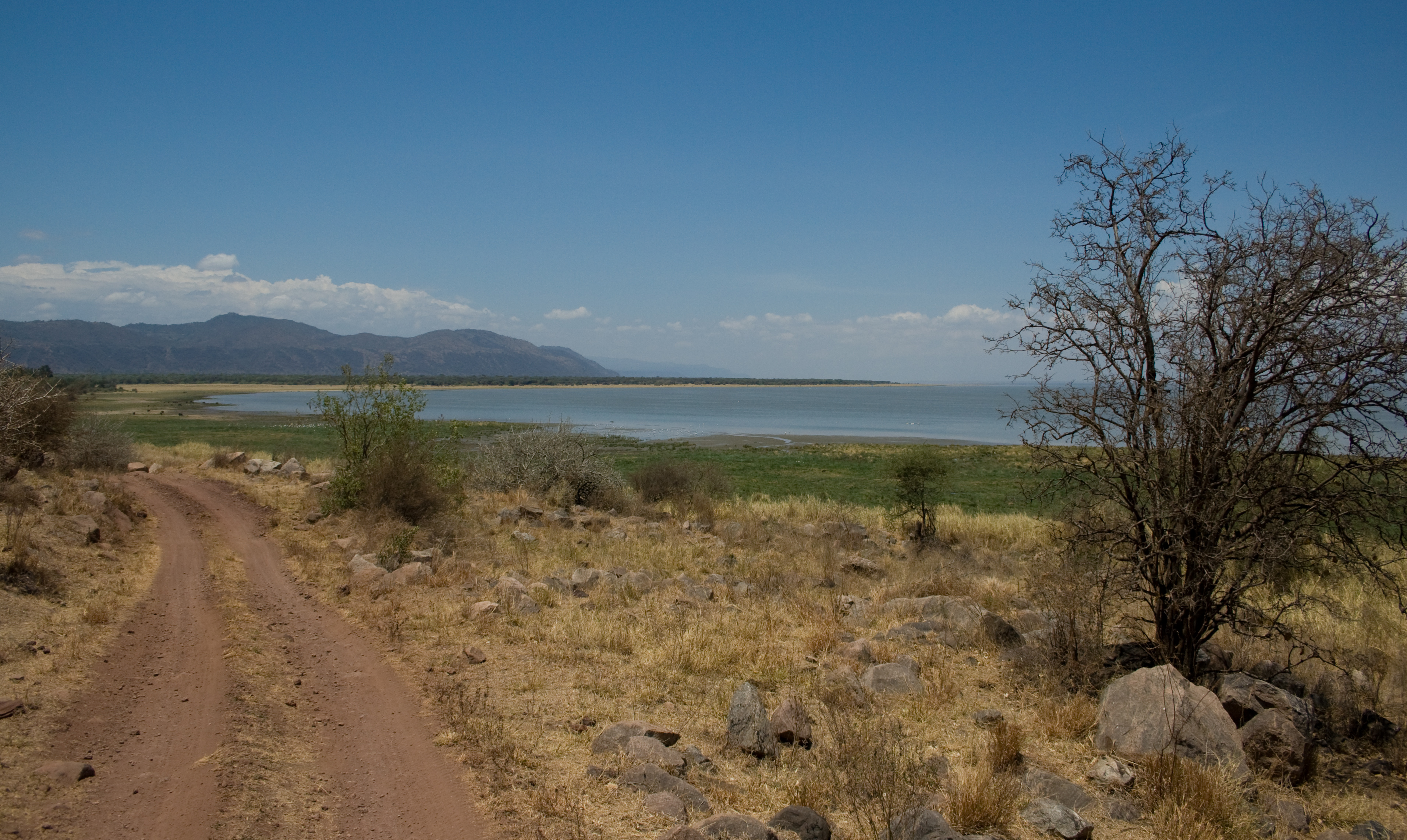 Lake Manyara national park, Tanzania.